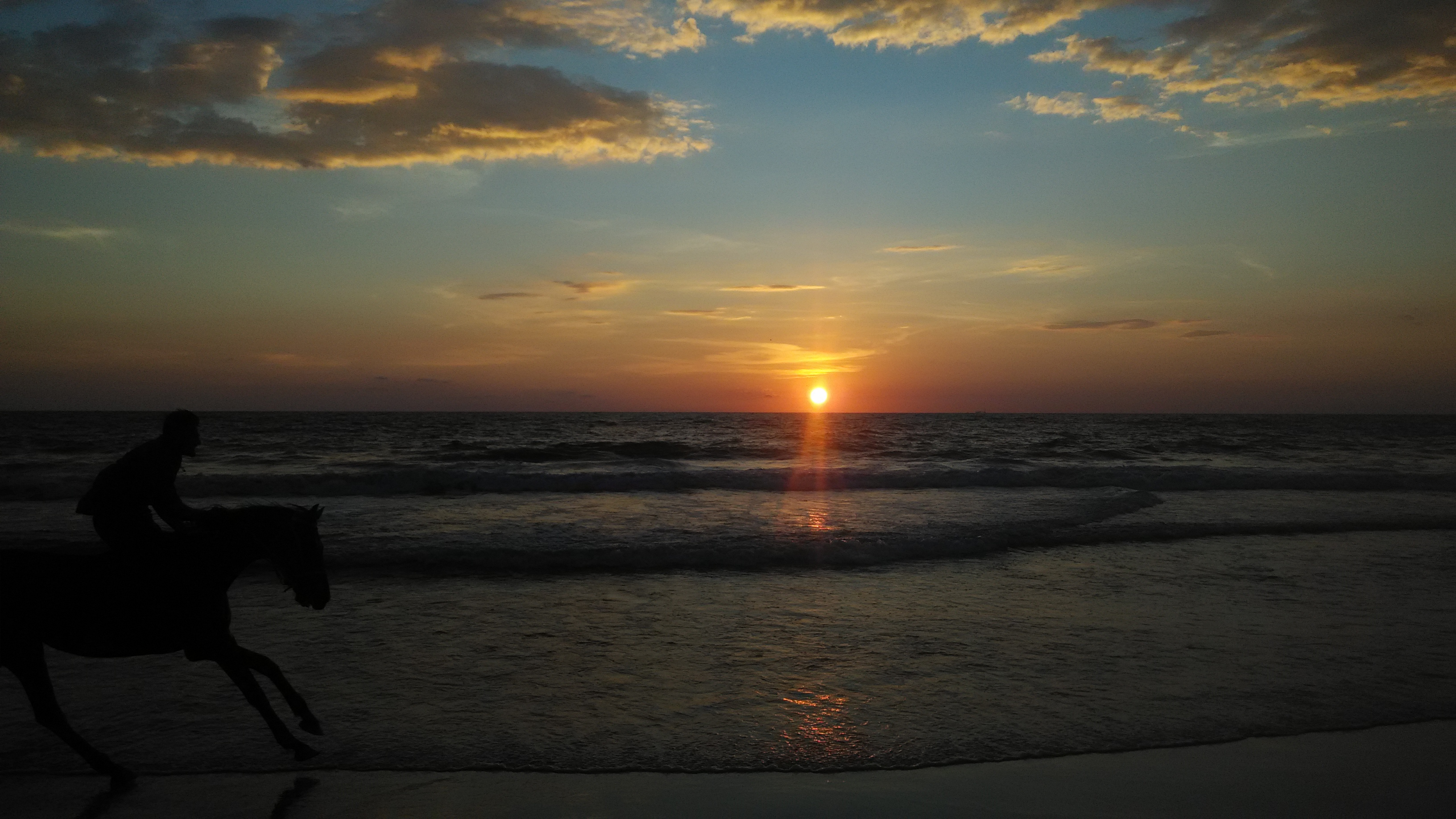 Sunset at Kappil beach near Varkkala, Kollam, Kerala